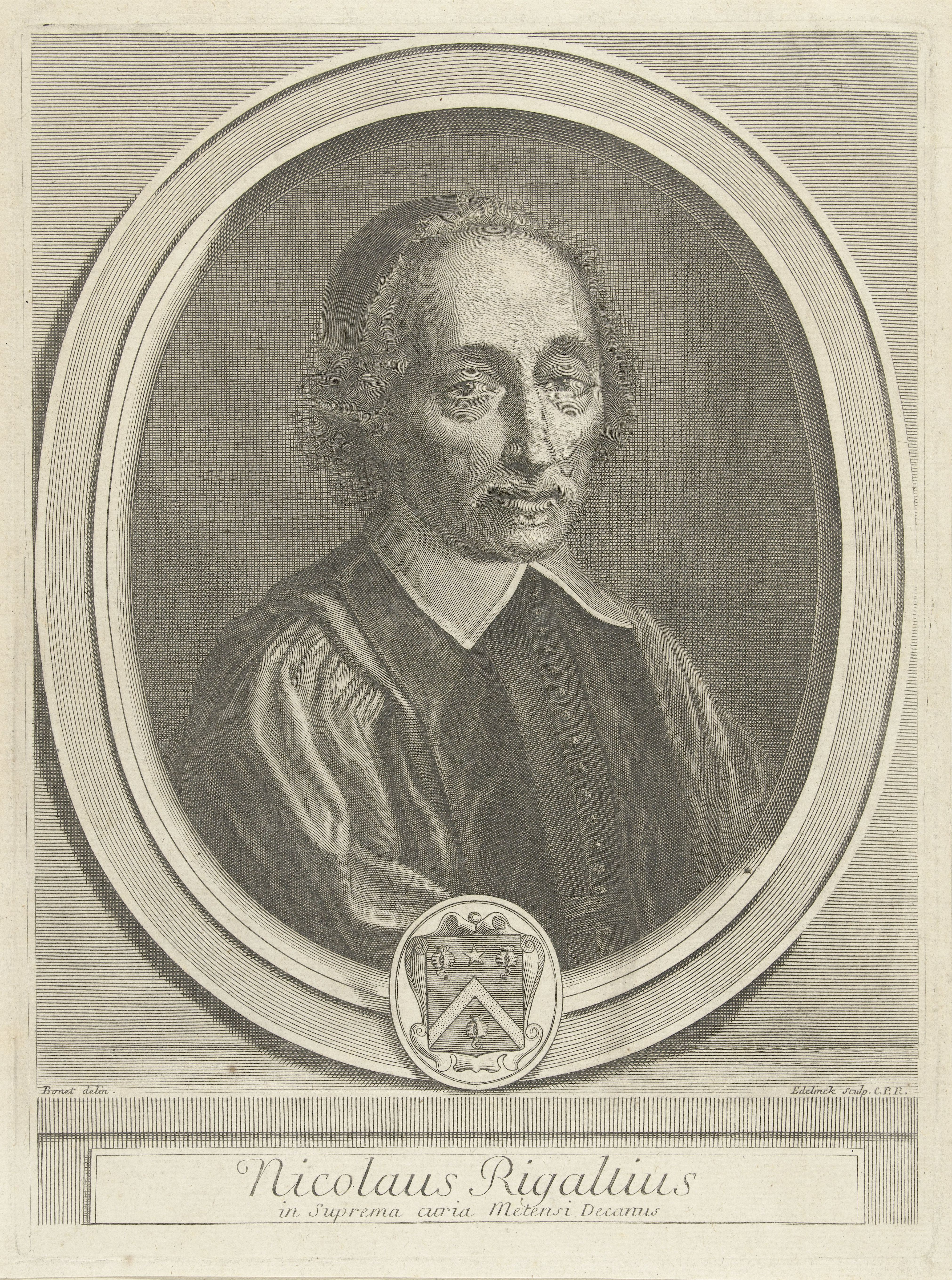 IdentificatieTitel(s): Portret van Nicolas RigaultNicolaus Rigaltius (titel op object)Objecttype: prent Objectnummer: RP-P-1910-4299Catalogusreferentie: Robert-Dumesnil 304-2(2)Opschriften / Merken: verzamelaarsmerk, verso, gestempeld: Lugt 2228Omschrijving: Portret van de Franse filoloog Nicolas Rigault (1577-1654), afgebeeld in ovale omlijsting met wapen.VervaardigingVervaardiger: prentmaker: Gerard Edelinck (vermeld op object)naar tekening van: Sylvain Bonnet (vermeld op object)verlener van privilege: Lodewijk XIV (koning van Frankrijk) (vermeld op object)Plaats vervaardiging: naar tekening van: onbekendverlener van privilege: FrankrijkDatering: 1666 - 1707Fysieke kenmerken: gravureMateriaal: papier Techniek: graveren (drukprocedé)Afmetingen: plaatrand: h 259 mm × b 193 mmOnderwerpWie: Nicolas RigaultVerwerving en rechtenVerwerving: aankoop 1905Copyright: Publiek domein